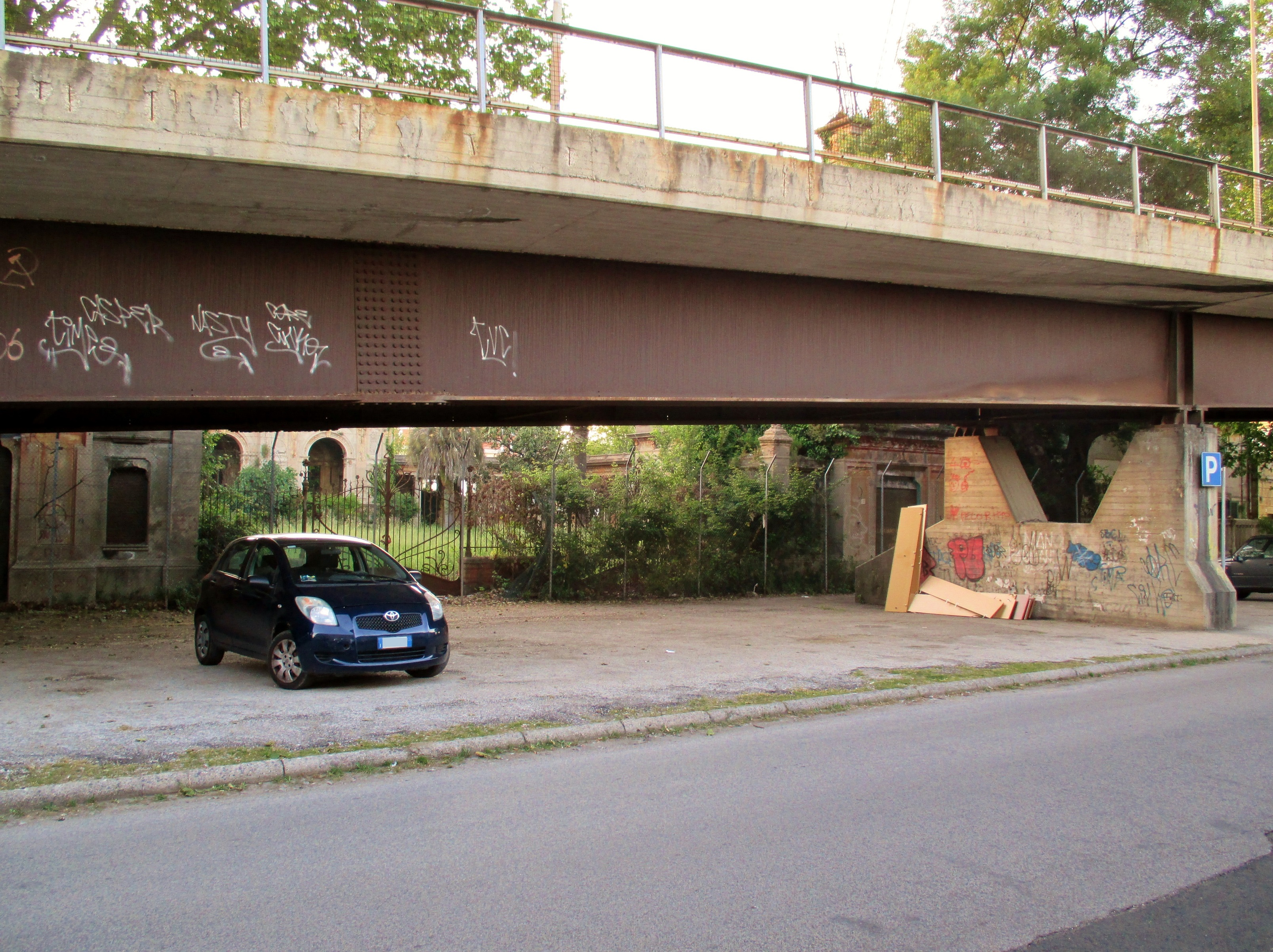 Livorno, veduta verso le Acque della Salute. In evidenza il ponte sulla linea ferroviaria sorto dinnanzi all'ingresso dello stabilimento e il degrado che interessa la zona.